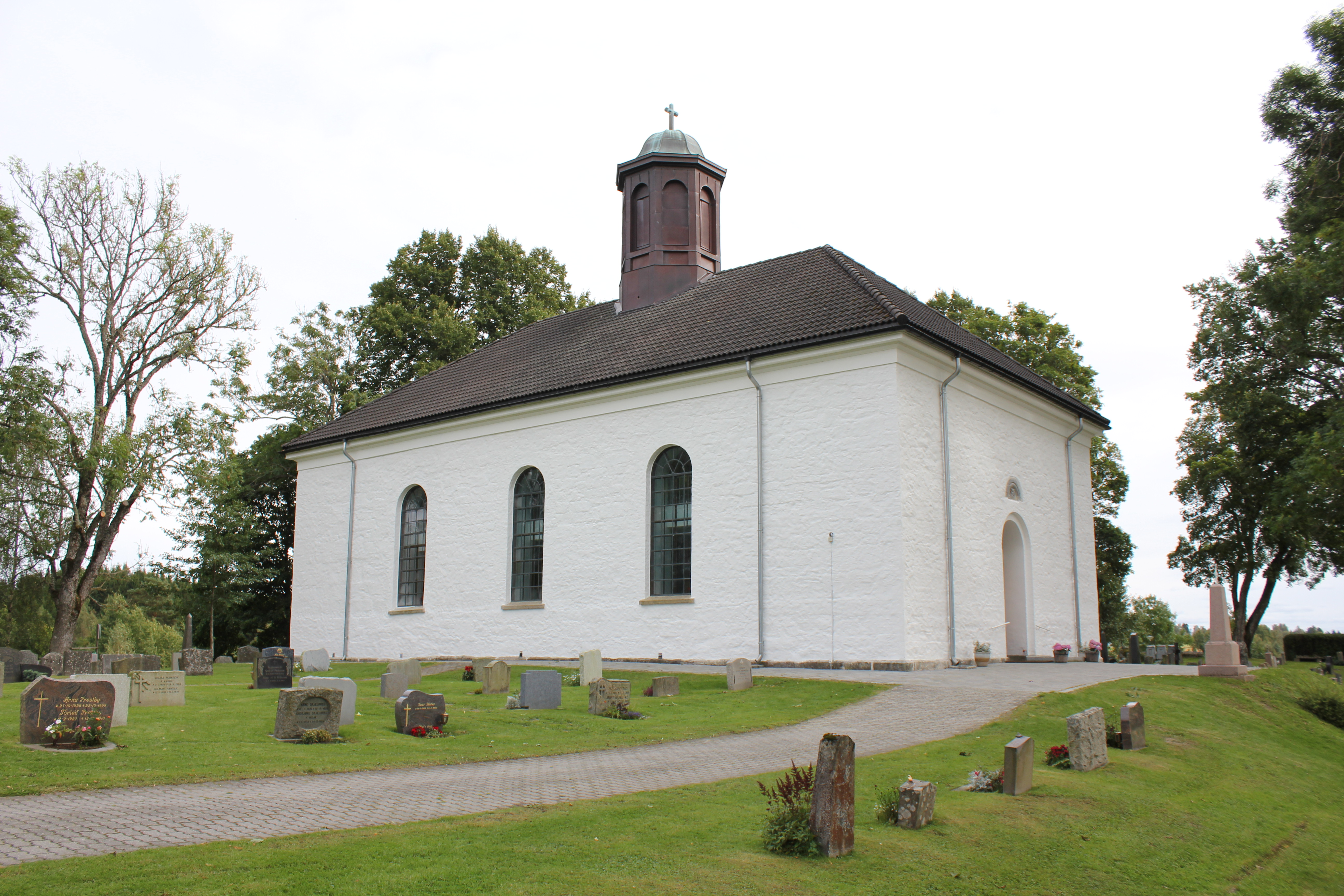 Spydeberg kirke i Østfold.